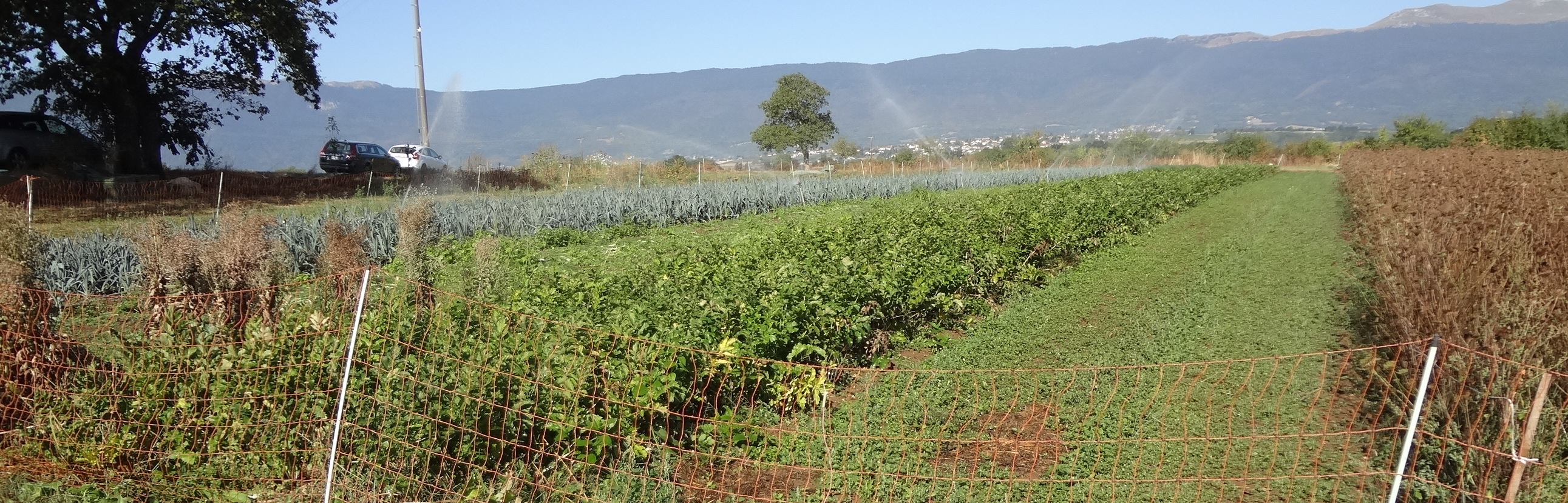 Jardins de Cocagne, Genève. Terrain d'Eaumorte (commune d'Avully).